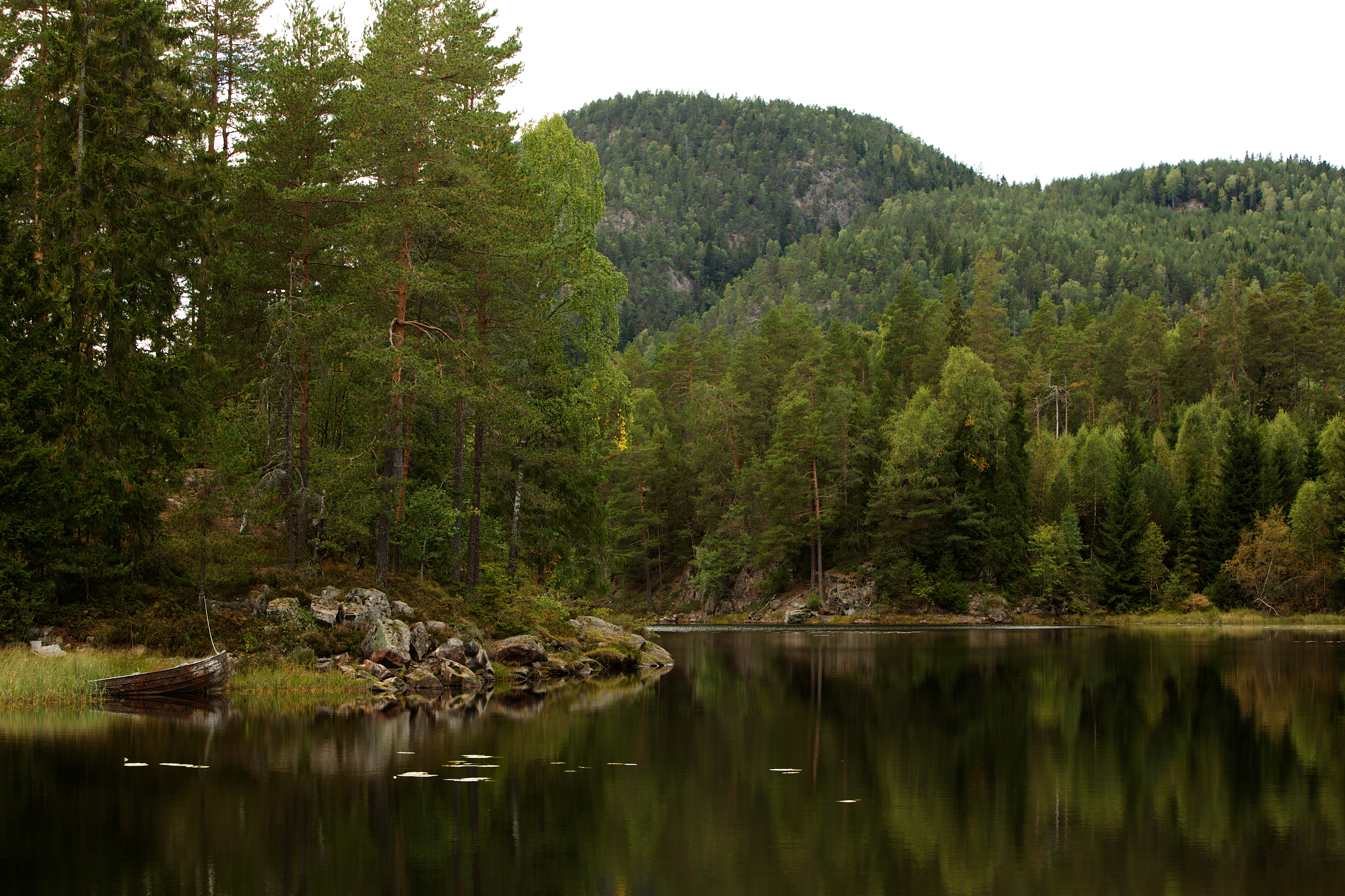 Lake Ulvsvann in Skien, Norway